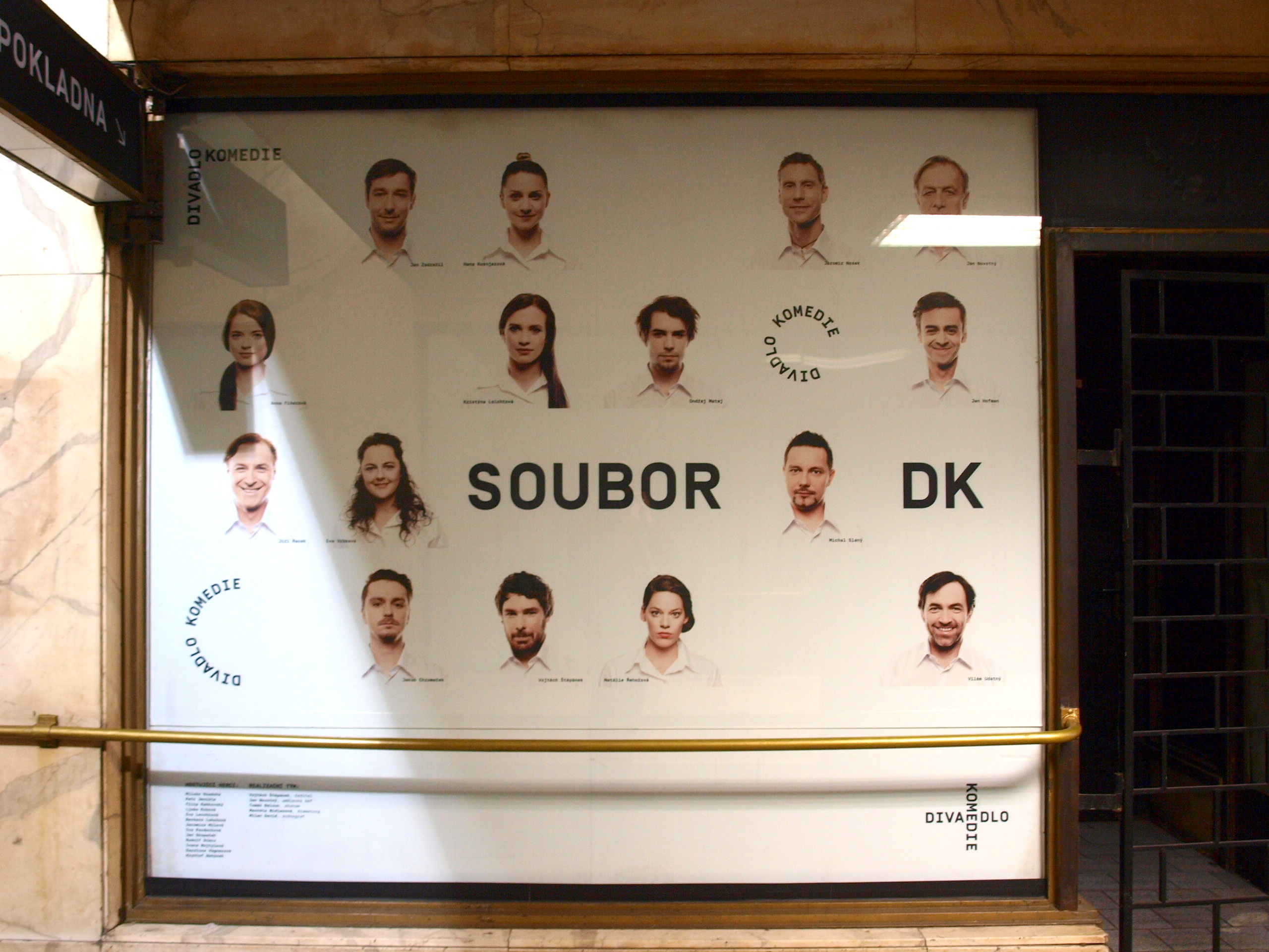 Divadlo Komedie Praha